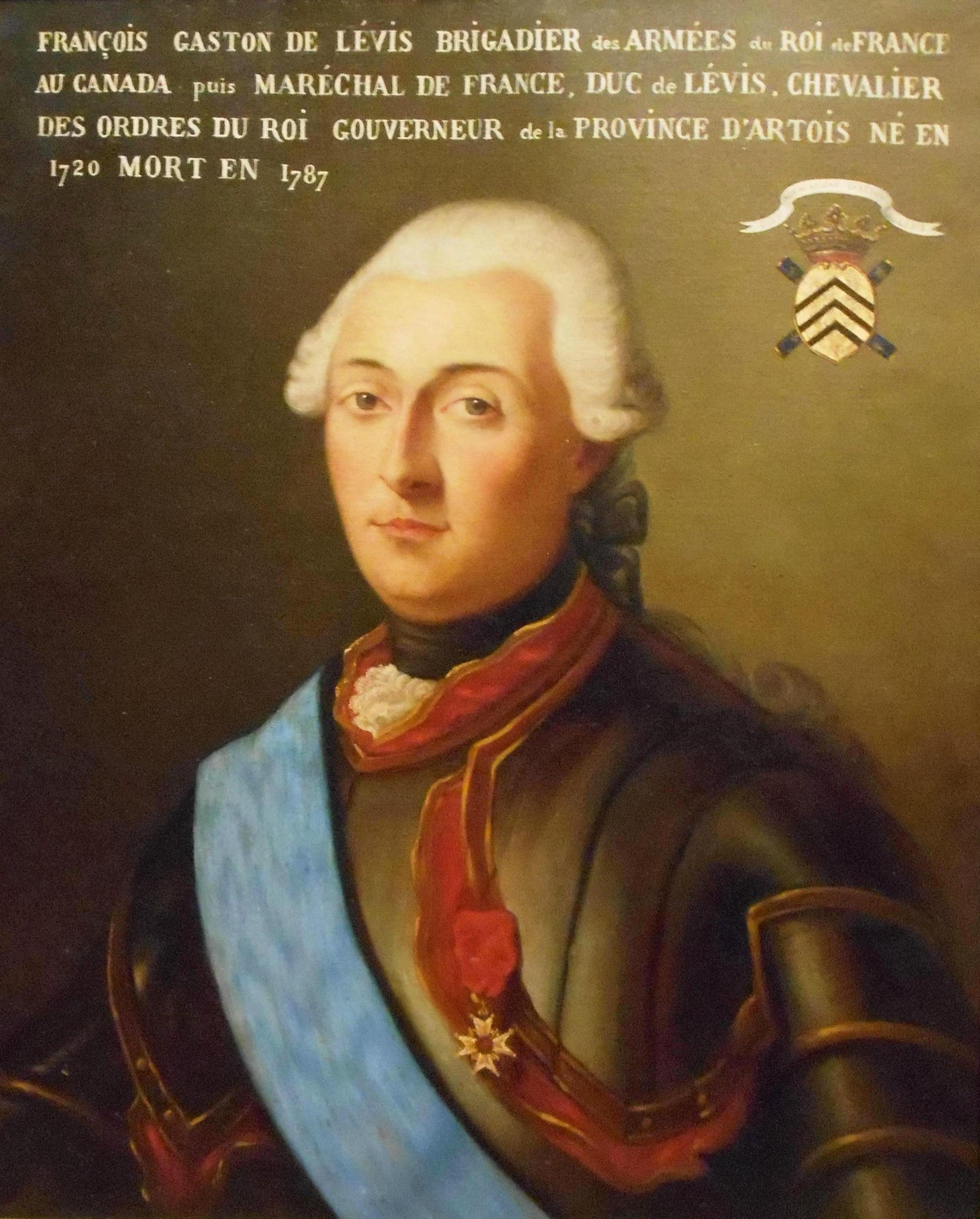 François-Gaston de Lévis (1720-1787), huile sur toile François-Gaston de Lévis arrive en Nouvelle-France en 1756, en qualité de commandant en second des troupes françaises. Il participe aux combats dans la région des Grands-Lacs, puis succède au général Montcalm (1712-1759), mort à la bataille des Plaines d'Abraham, à titre de commandant en chef des troupes françaises. Il repousse les troupes anglaises à l'intérieur des murs de Québec à partir de Sainte-Foy. Il entreprend ensuite le siège de la ville, mais l'arrivée de renforts britanniques l'oblige à se replier vers Montréal où il doit capituler à l'automne de 1760. À son retour en France, il est nommé maréchal de France, puis duc de Lévis.